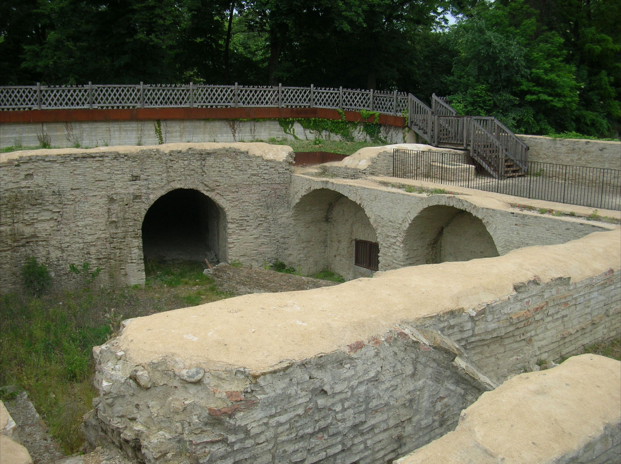 Restauro del Bastione Santa Maria presso la Cittadella di Parma.